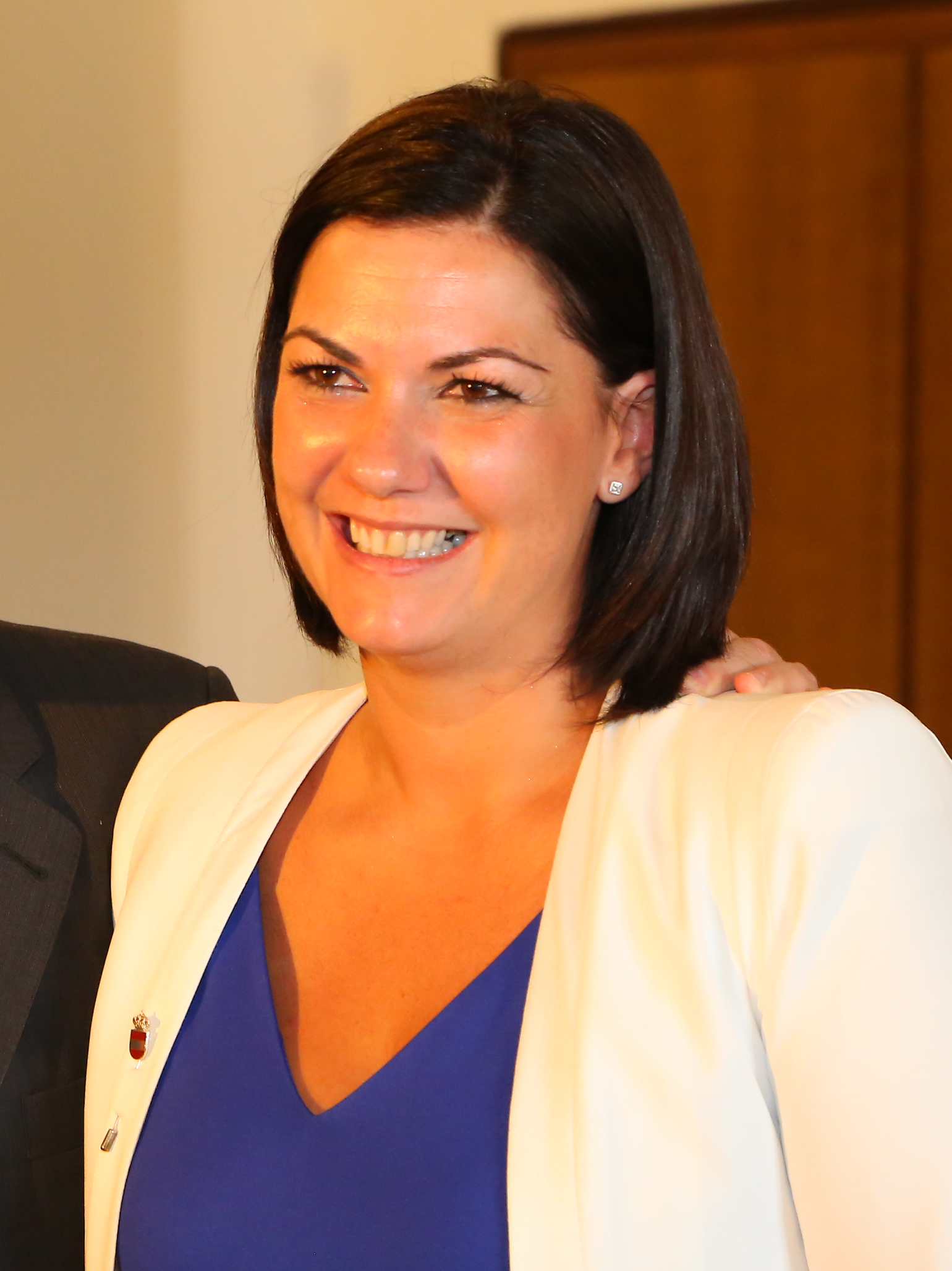 El presidente de Castilla-La Mancha, Emiliano García-Page, se ha reunido esta mañana con la alcaldesa de Puertollano, Mayte Fernández, y la delegada provincial de la Junta en Ciudad Real, Carmen Olmedo, para analizar los retos y las necesidades más importantes para la ciudad industrial. En este sentido, Olmedo ha destacado la recuperación de la normalidad política e institucional que representa este encuentro del máximo responsable del Gobierno regional con la alcaldesa de Puertollano, pues recuerda que, pese a solicitarlo en varias ocasiones, el anterior Ejecutivo de Cospedal jamás recibió a Mayte Fernández.